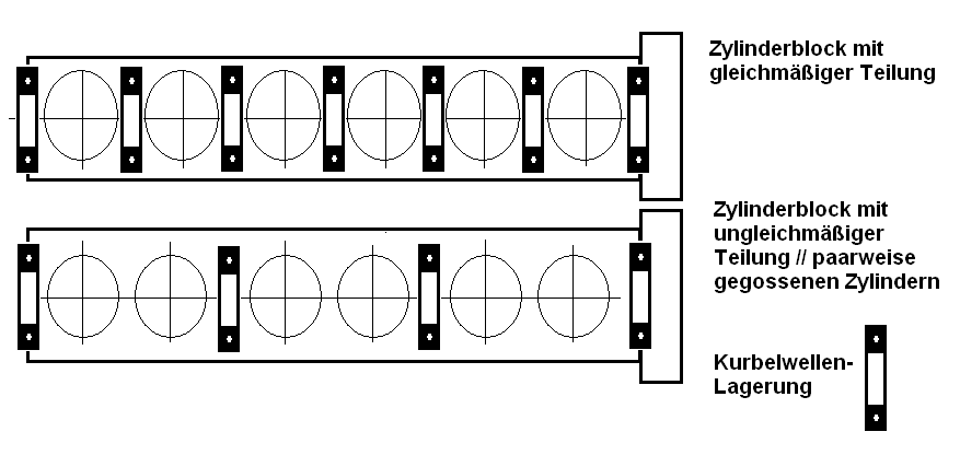 Teilungsarten von Reihensechszylindern